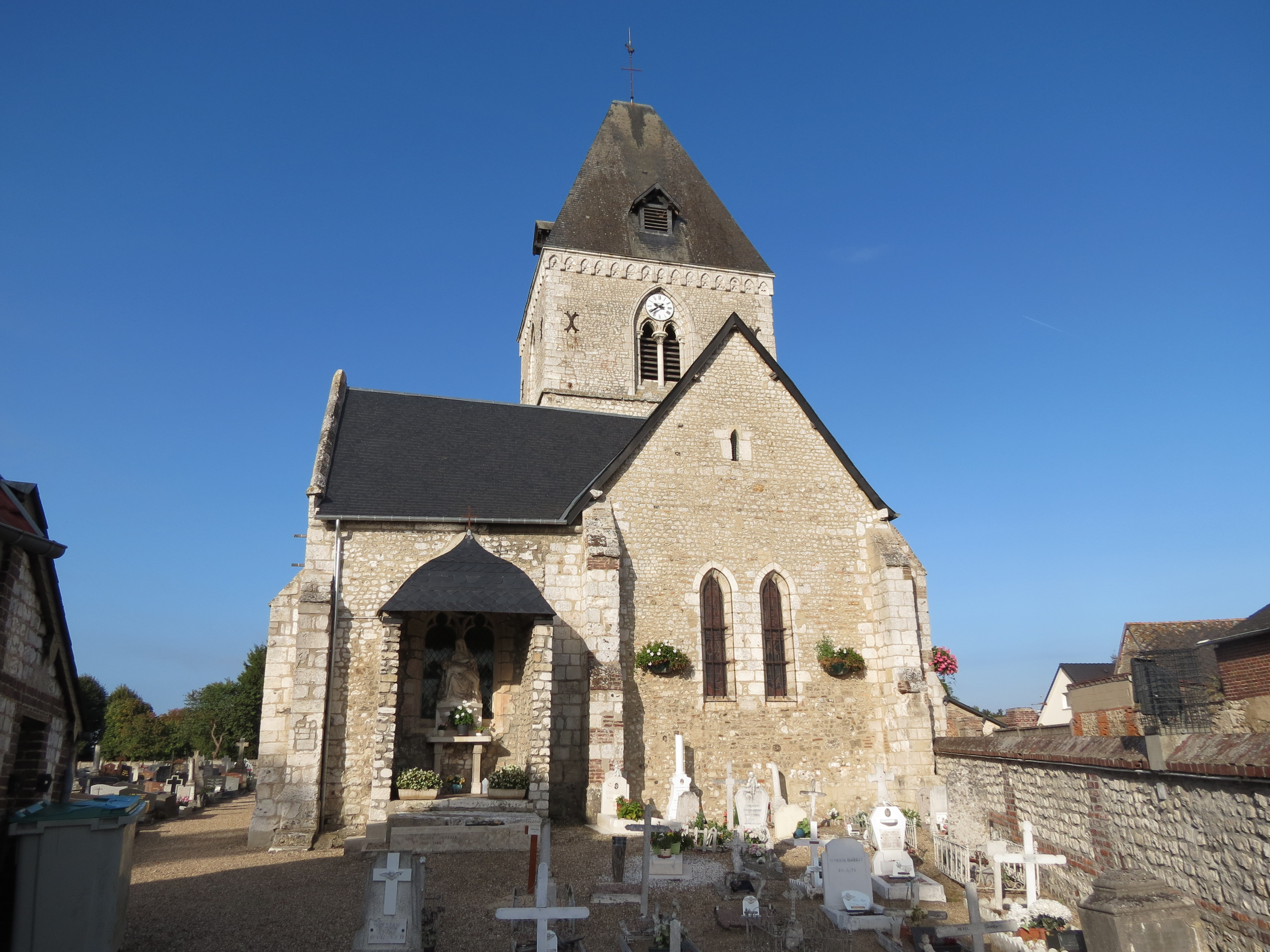 Église Notre-Dame de Pîtres.